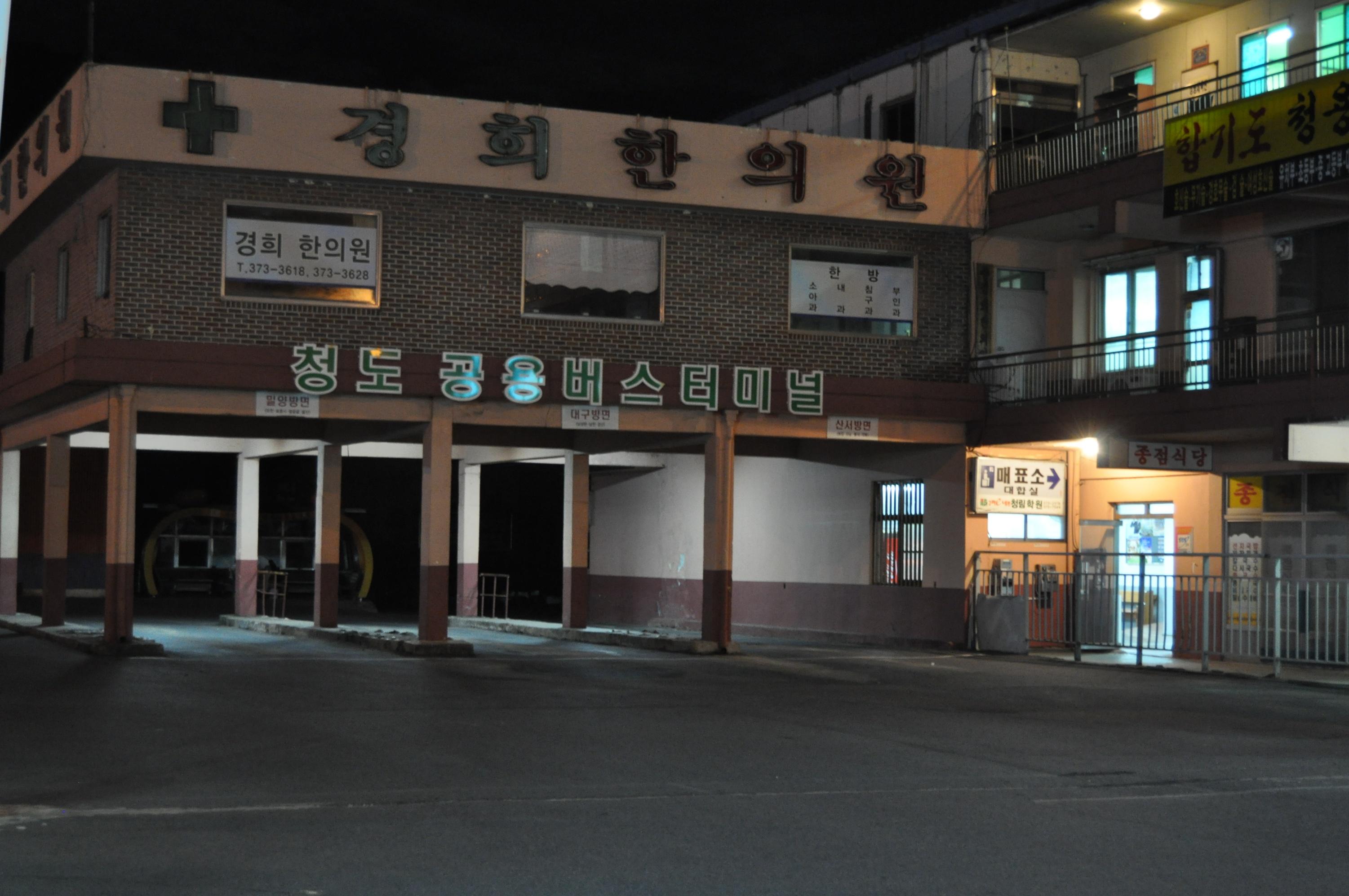 청도 공용버스터미널